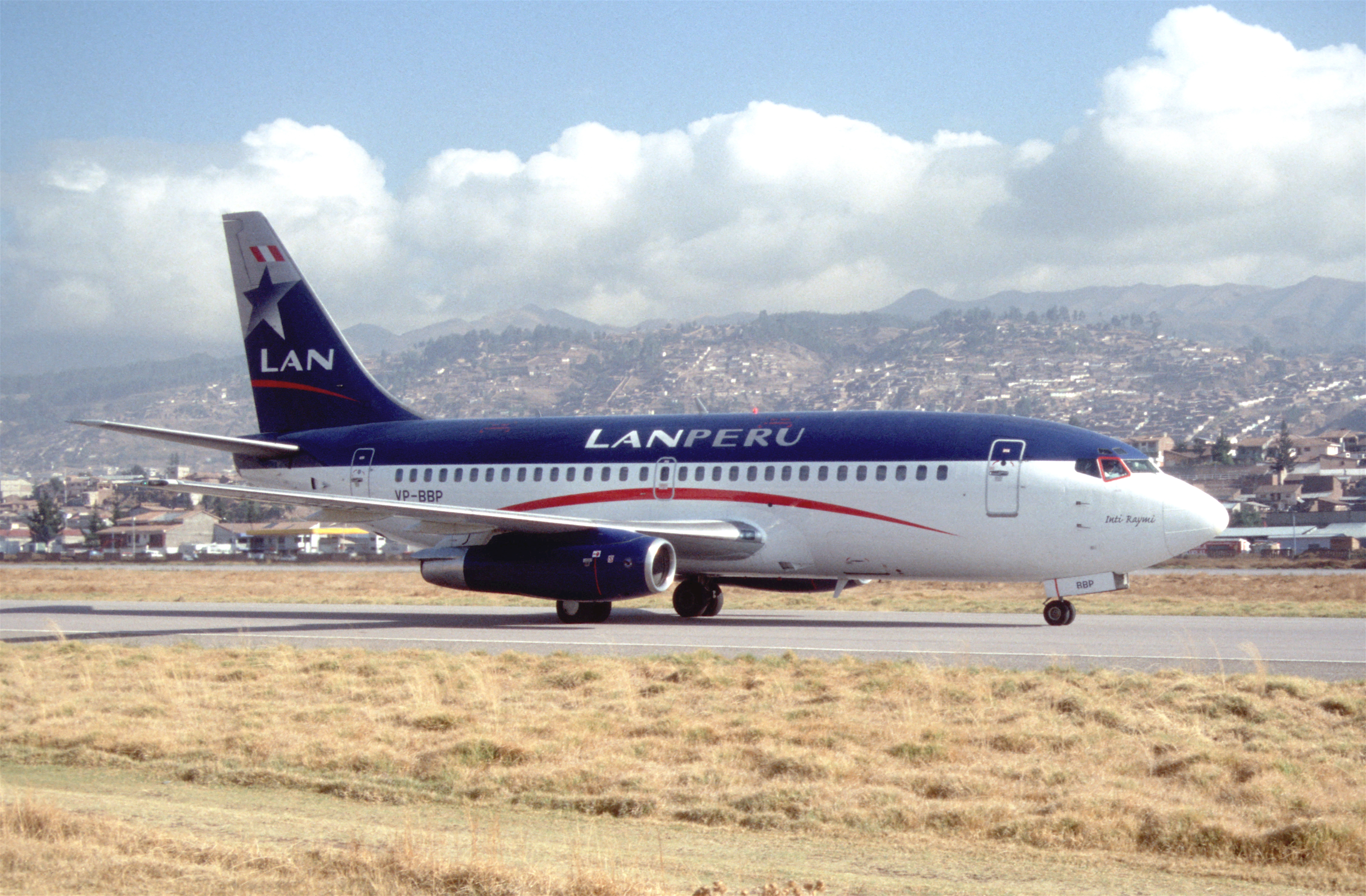 110ah - LAN Peru Boeing 737-2Q3; VP-BBP@CUZ;29.09.2000